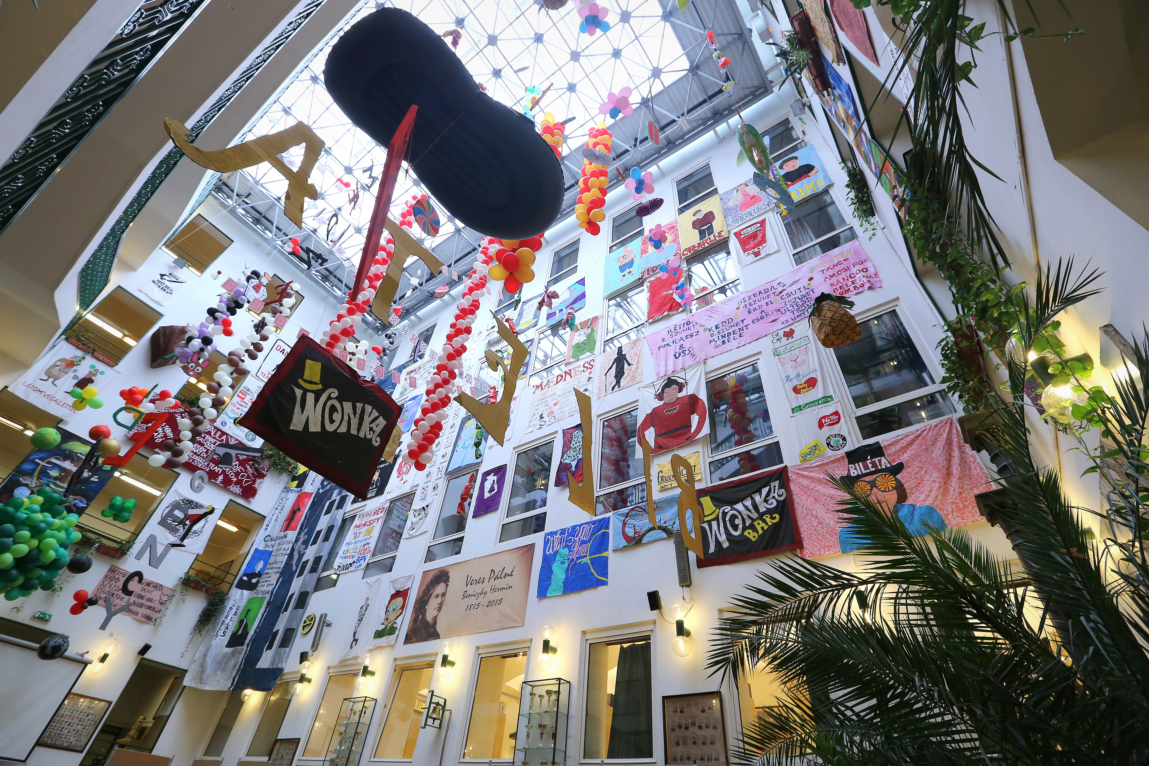 A 2016-os Veres Pálnés napok - a gimnázium aulája